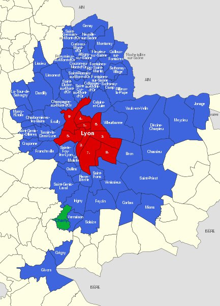 Communes du Grand Lyon, en vert Charly